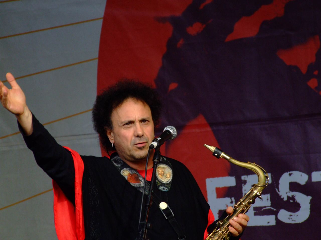 Italian musician Enzo Avitabile